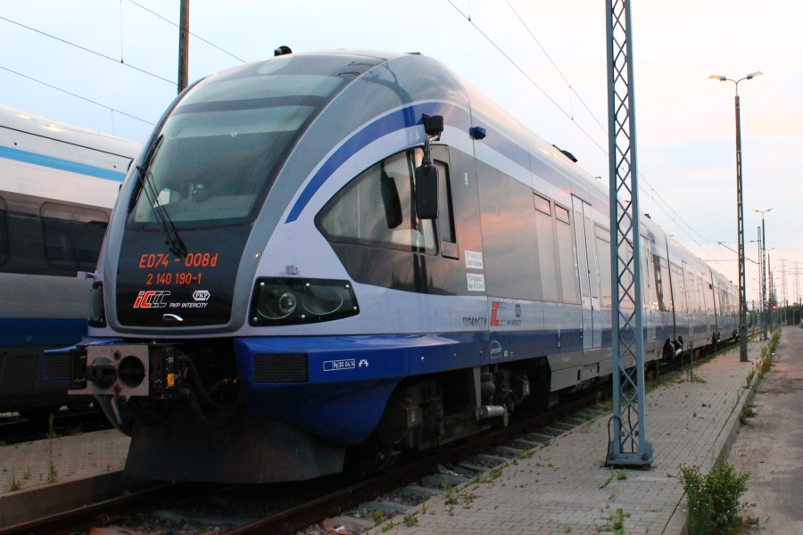 Elektryczny zespół trakcyjny ED74-008 na terenie stacji postojowej Warszawa Grochów.